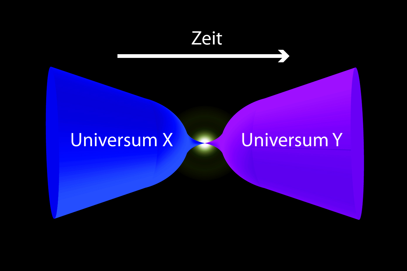 Die mögliche Entstehung eines Universums nach der Schleifen-Quanten-Kosmologie